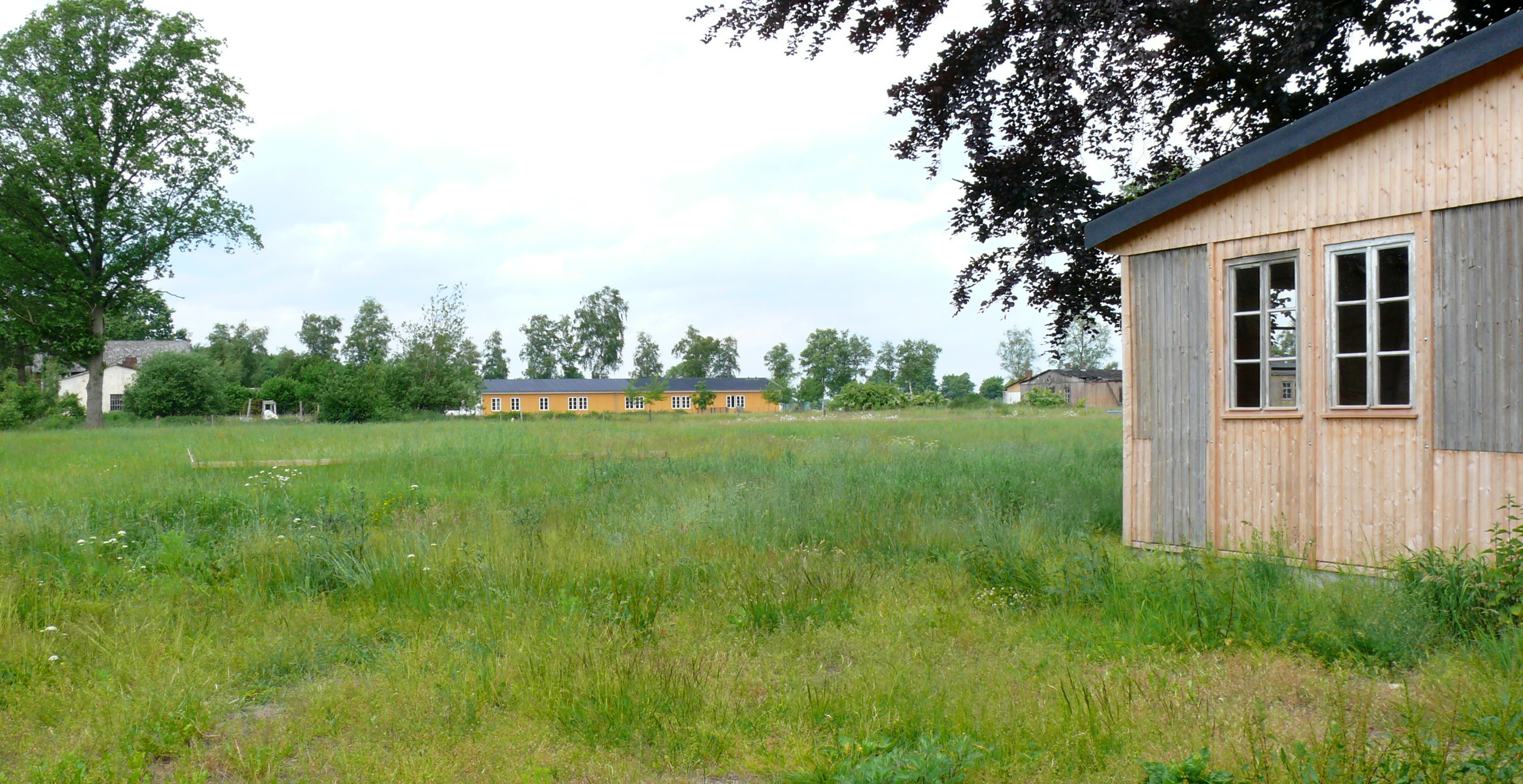 Gedenkstätte Stalag X B Sandbostel / Blick über das Gelände: rechts "CVJM-Baracke" (Informationen über die Nutzung nach 1945) hinten "Gelbe Baracke" (Ausstellung über die Zeit von 1939 - 45)